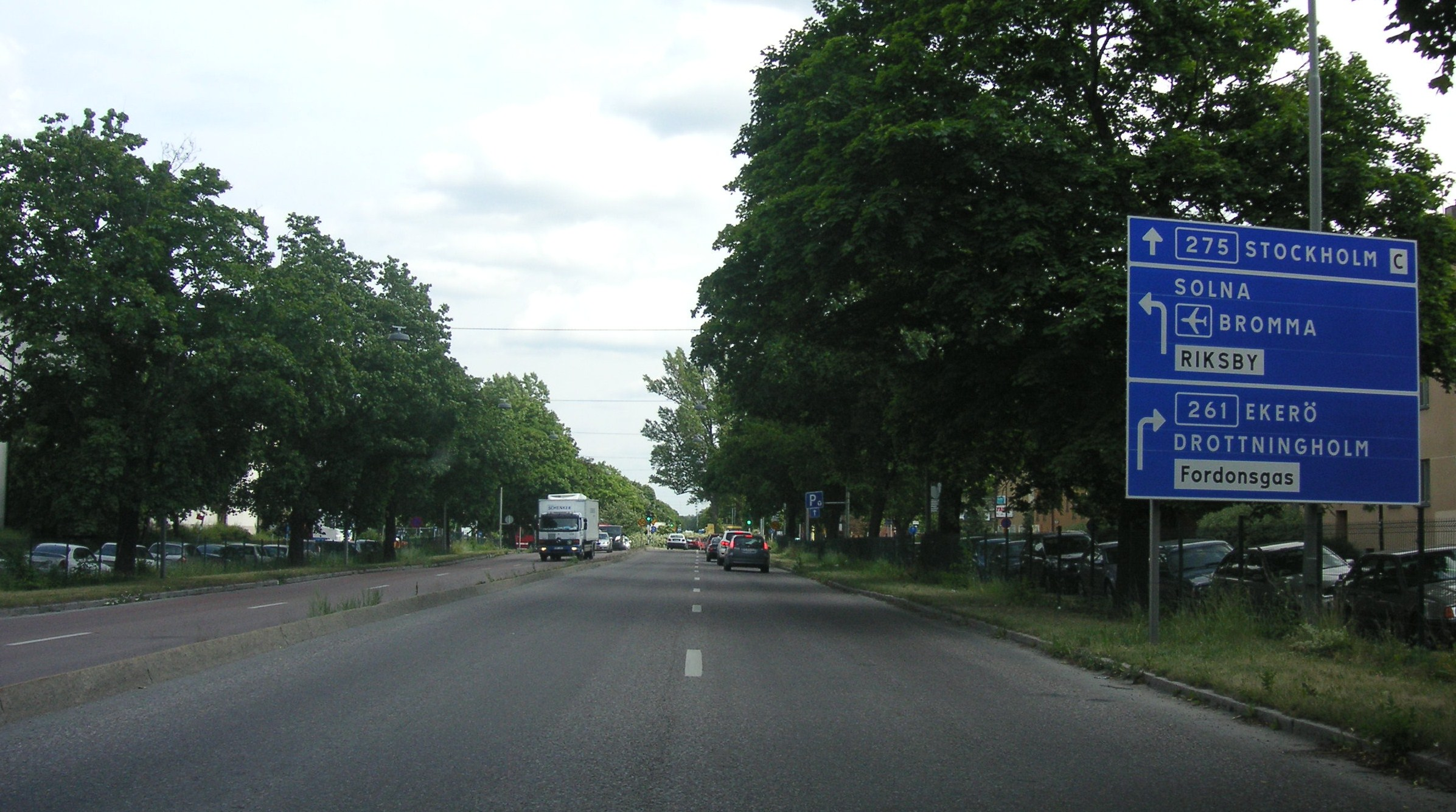 Bergslagsvägen i Bromma, Stockholm